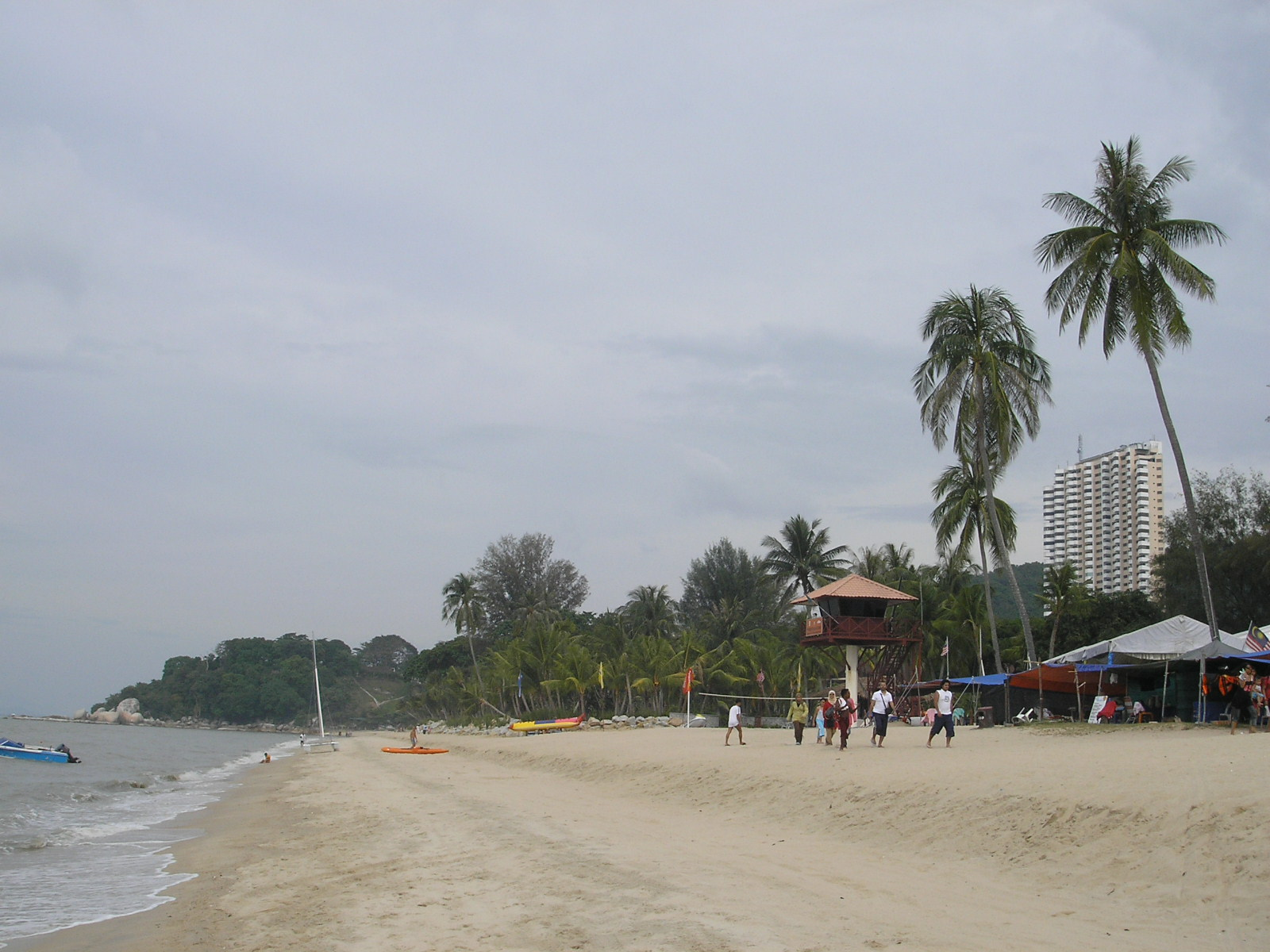 Batu Ferringhi beach in Penang.